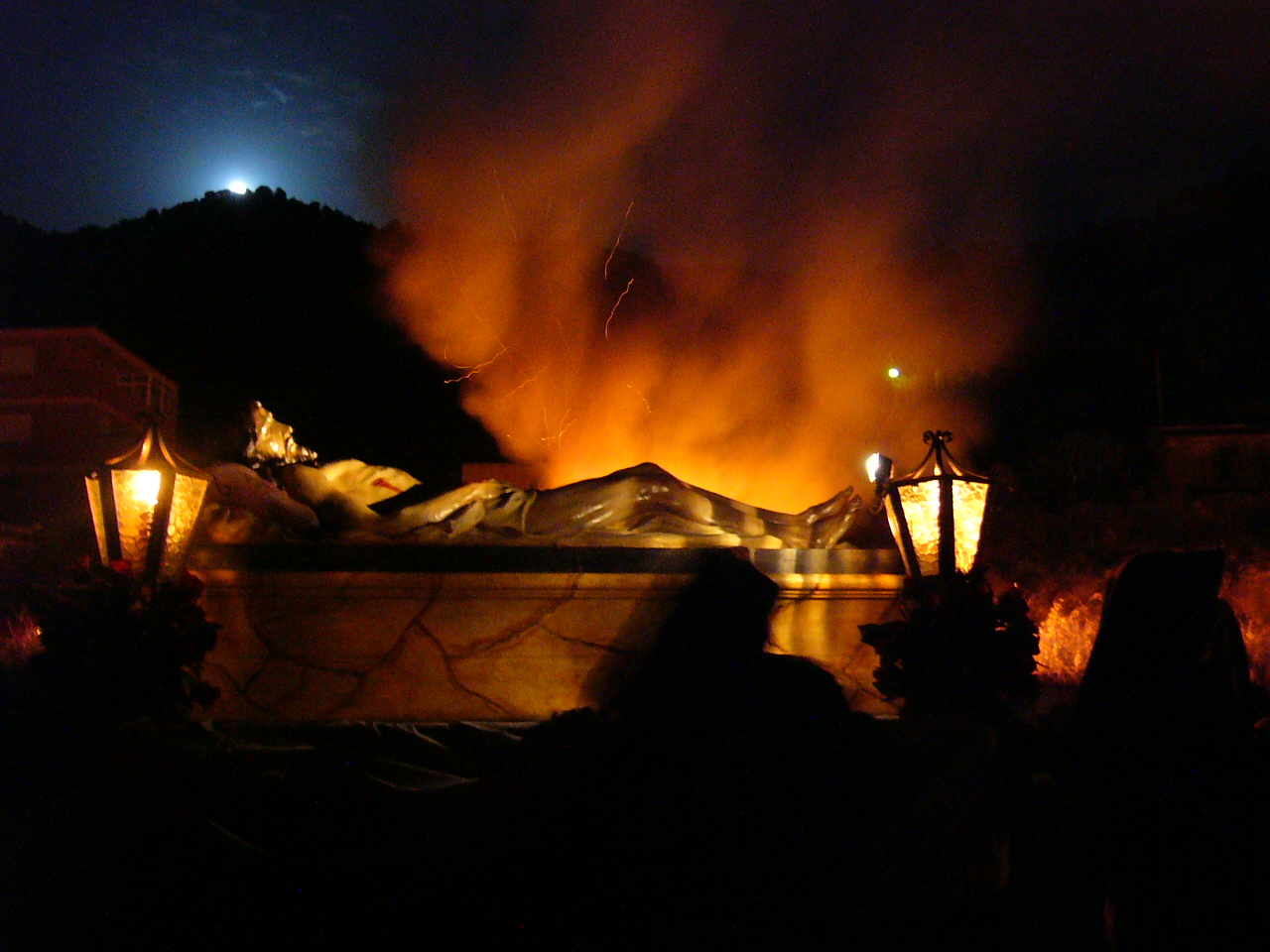 Procesión del Cristo de la Salud a su paso por el barrio del Monte de la Sangre en Algezares (Murcia) donde los vecinos encienden hogueras y los Auroros de PAtiño cantas salves.